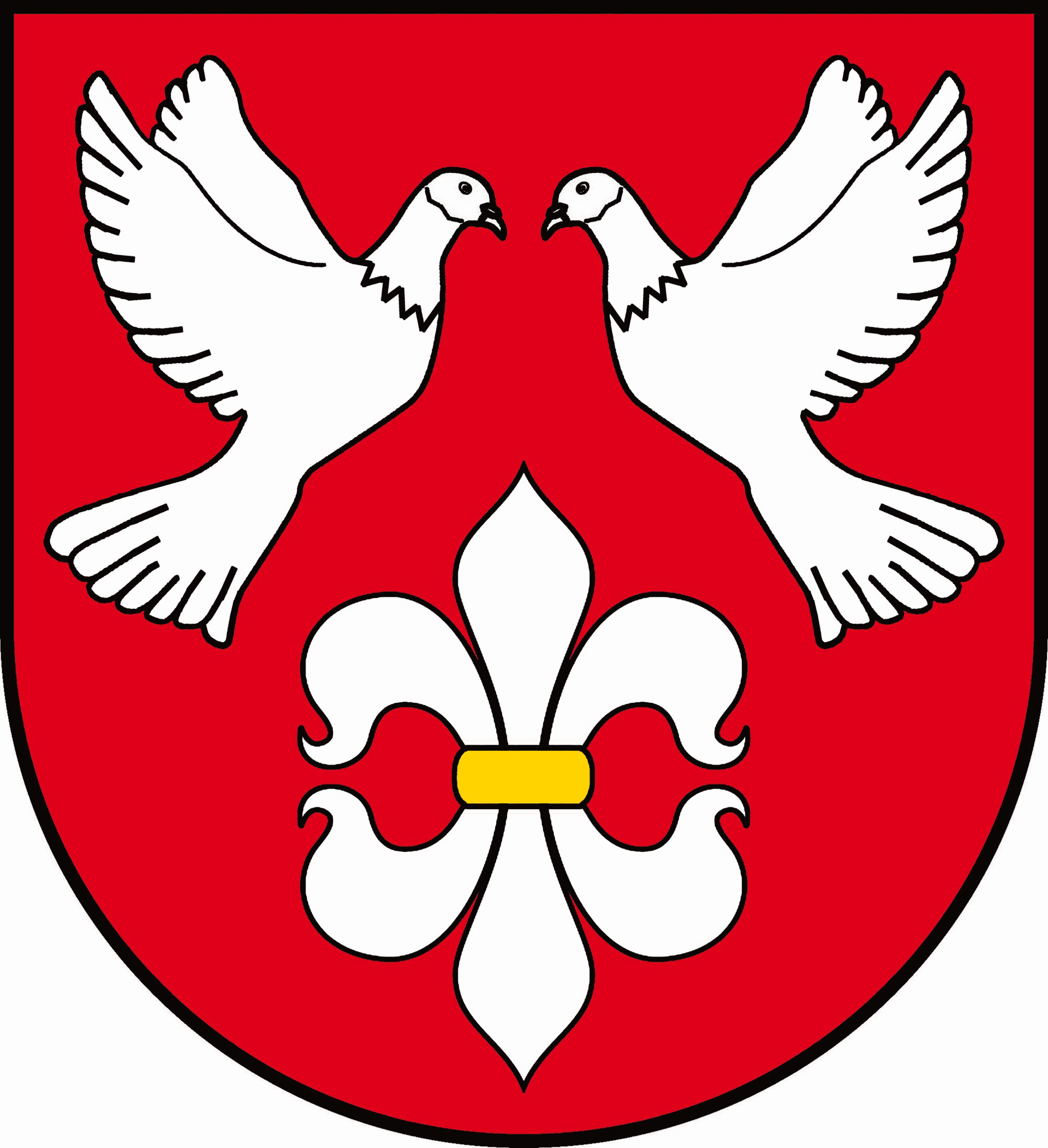 Herb gminy Świercze